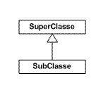 Representação de herança entre classes em diagrama UML. Autor: Jorge Roberto Diniz Martins